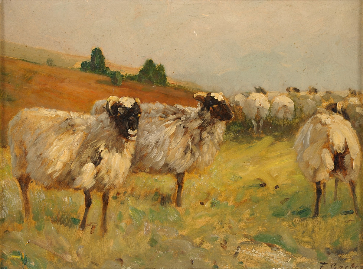 Heidschnucken. Signiert. Öl auf Malkarton, 30 x 40 cm